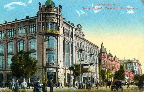 Таганрогский проспект на старой открытке